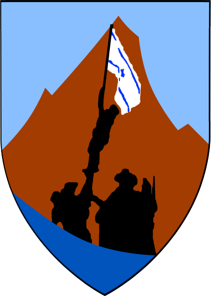 התג של חטיבת יואב בו השתמש גדוד ברדלס.